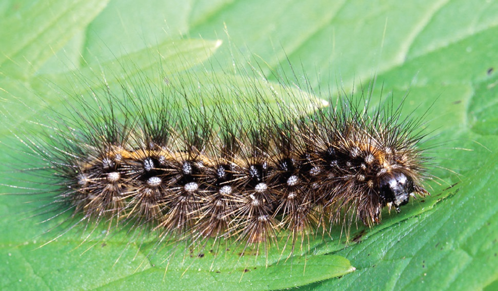 Borearctia menetriesii